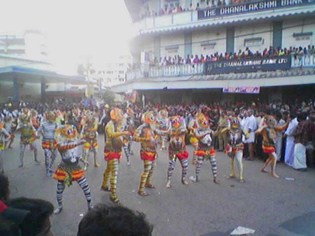 തൃശൂരിലെ പുലിക്കളി - ഒരു ദൃശ്യം